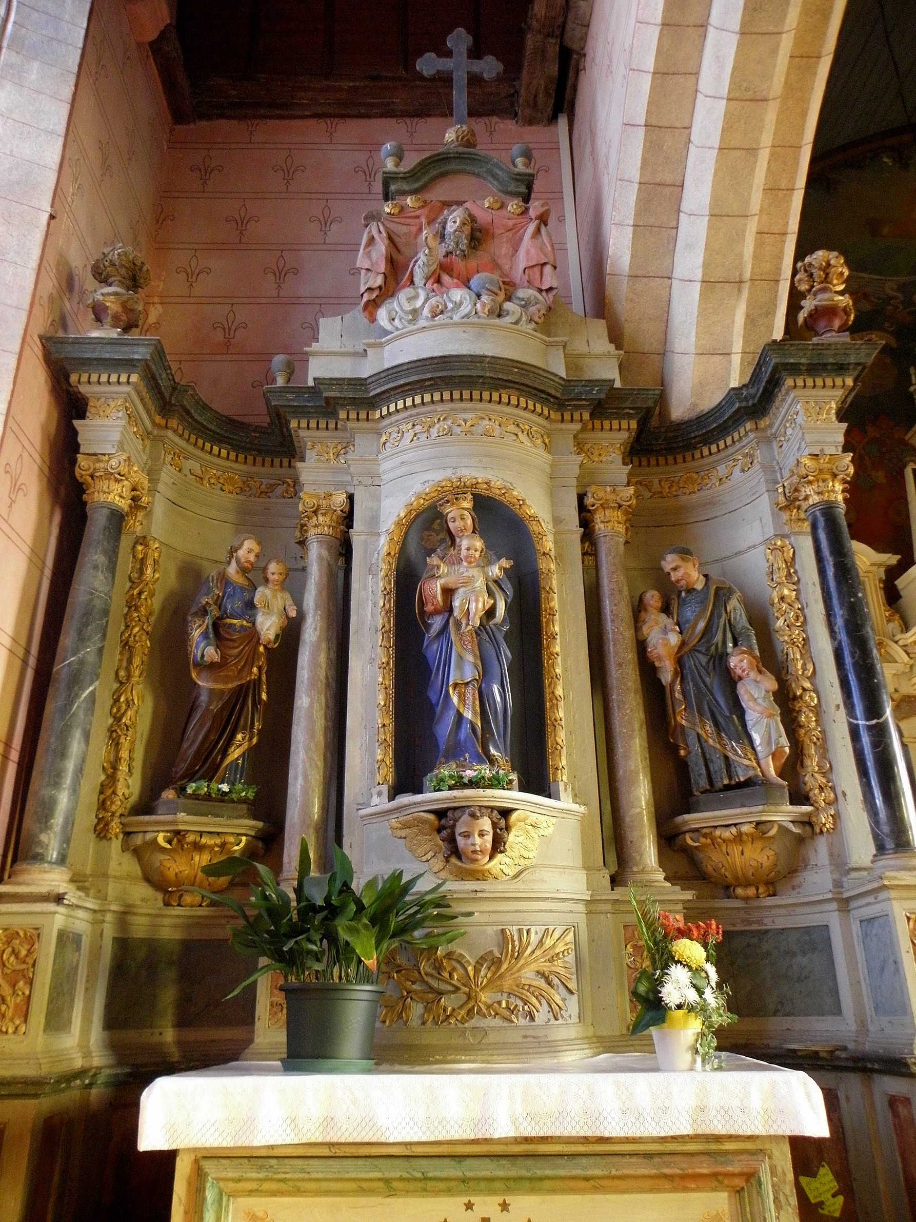 Église Saint-Médard de Torcé (35). Autel et retable nord. Statues de Saint-Joseph, de la Vierge à l'Enfant et de Saint-Vincent-de-Paul.